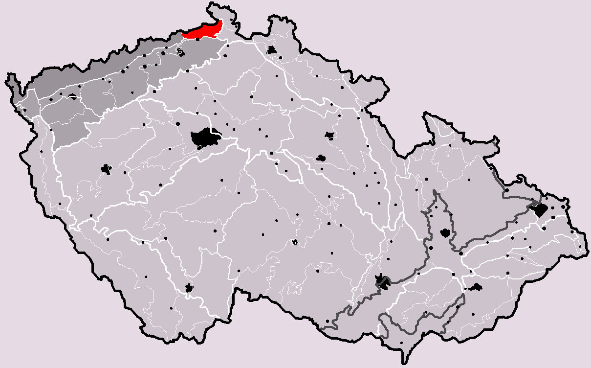 Poloha geomorfologického celku Smrčiny v rámci České republiky. Hercynský systém Hercynská pohoří I Česká vysočina I3 (III) Krušnohorská subprovincie I3A (IIIA) Krušnohorská hornatina I3A-3 (IIIA-3) Děčínská vrchovina